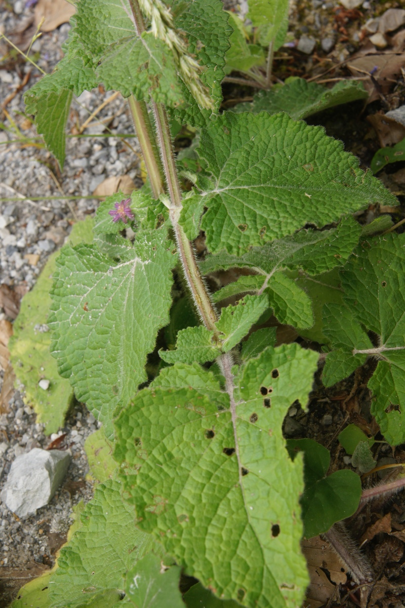 Vretenčasta kadulja v Selu nad Polhovim Gradcem.